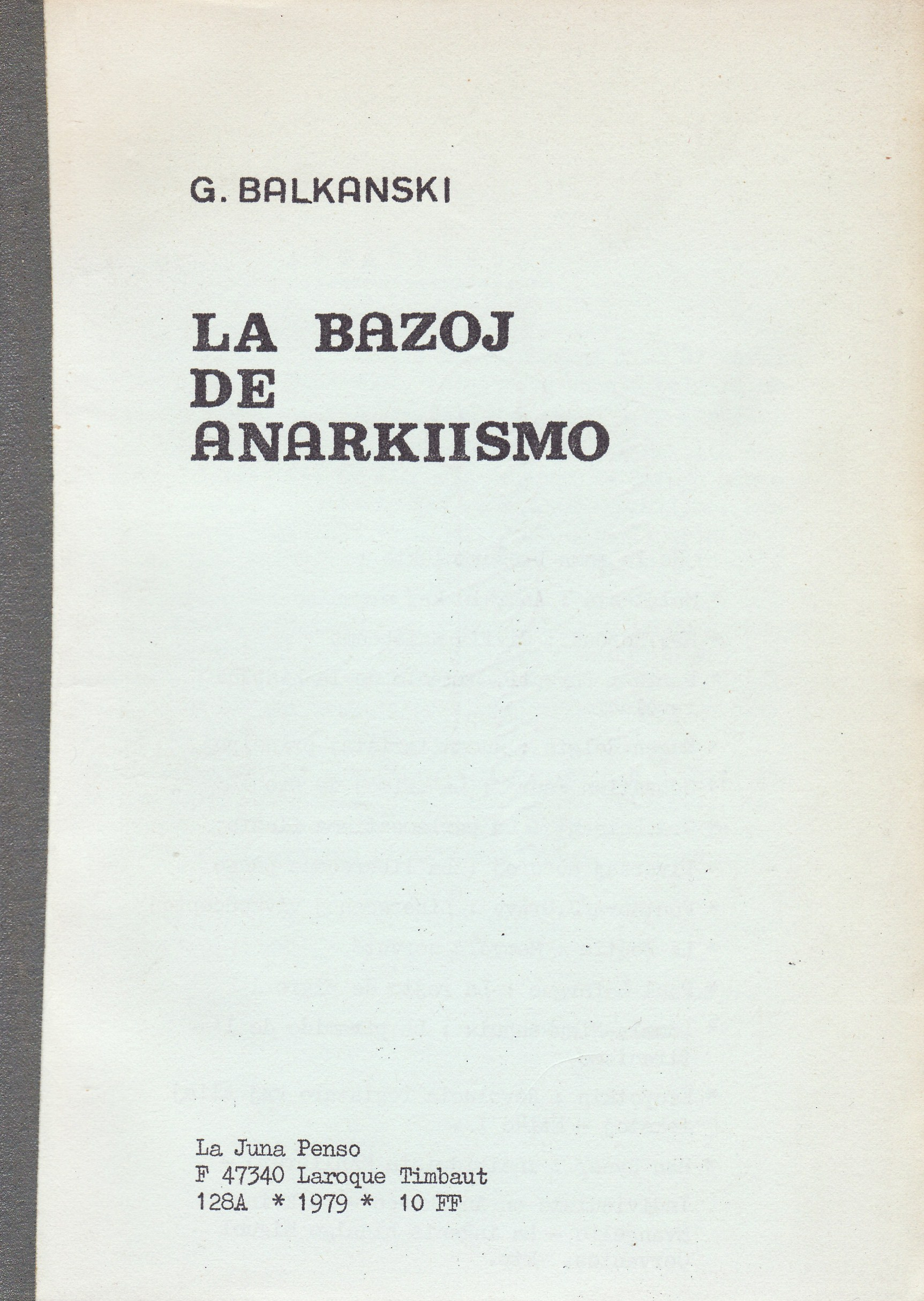 la kovrilpaĝo de "La Bazoj de Anarkiismo"